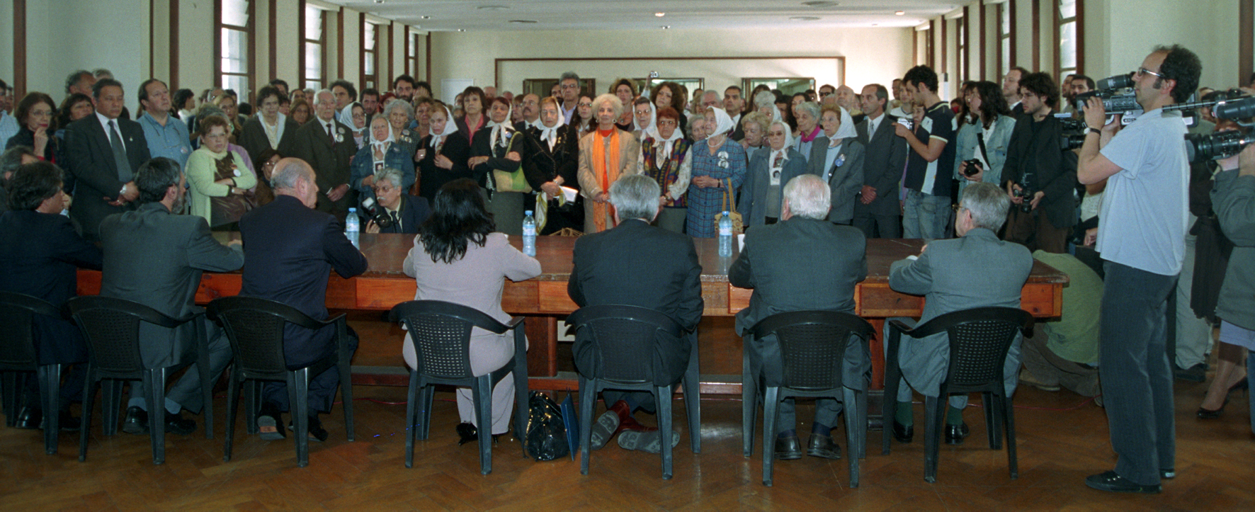 La Ministra de Defensa Nilda Garré encabezó el acto de entrega de las instalaciones de la antigua ESMA a la comisión bipartita que desde ese momento coordina su funcionamiento, integrada por la Secretaría de Derechos Humanos de la Nación y la Subsecretaría de Derechos Humanos del Gobierno de la Ciudad de Buenos Aires